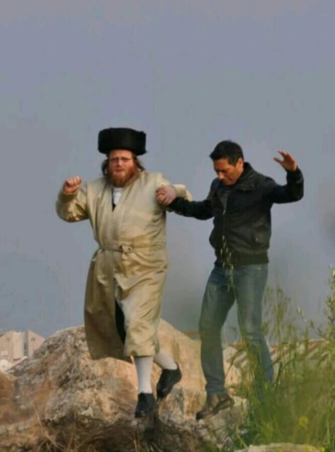 קנר ואחד ממגידי השיעורים בבית המדרש, מתוך תמונה שהוצגה בתערוכה בבית הנשיא. הקרדיט לצילום: נורית יעקבס יינון